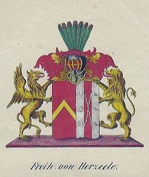 Wappen derer Freiherren von Herzeele